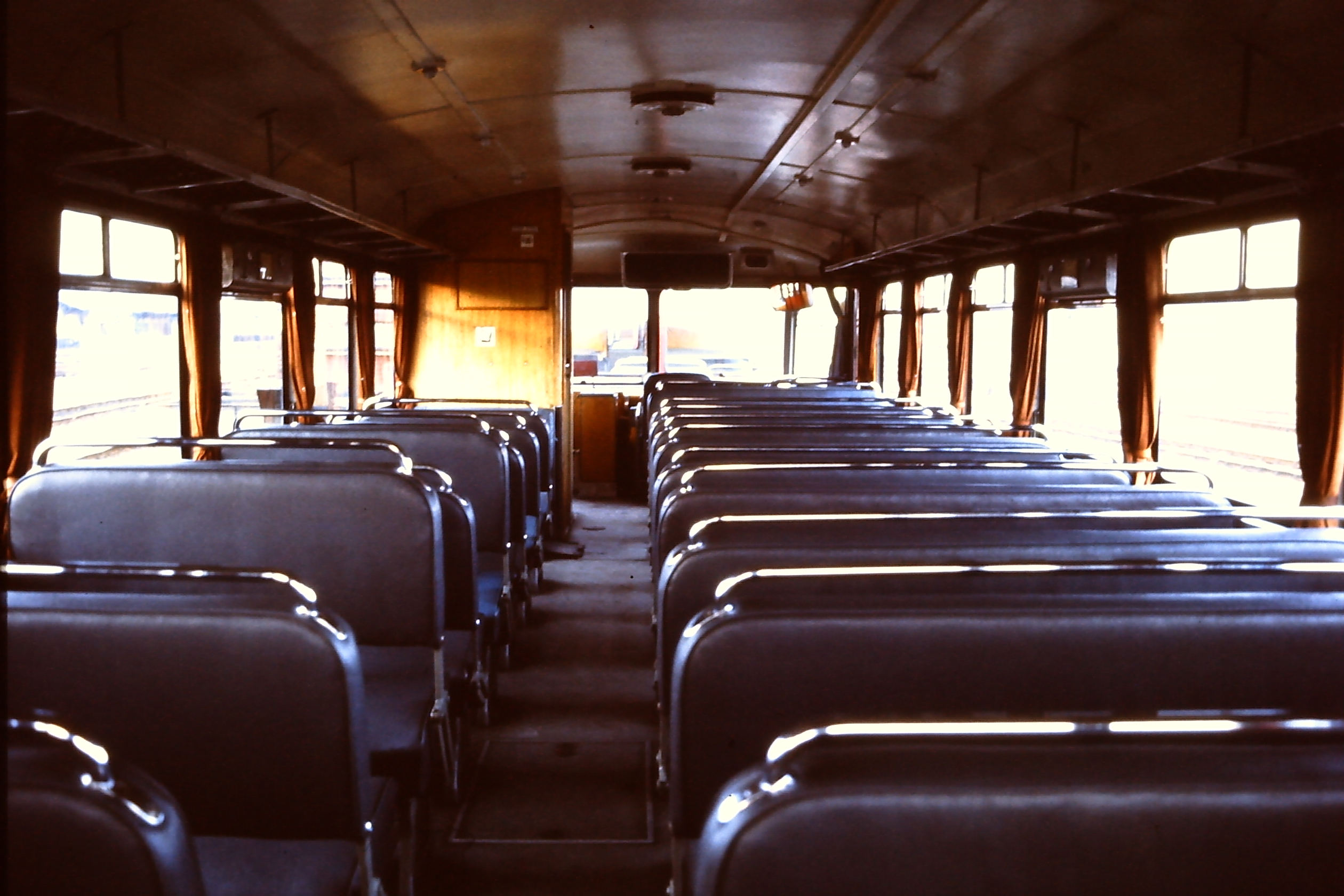 Fahrgastraum eines Schienenbus der Baureihe 798 im Bahnbetriebswerk Landau/Pfalz.